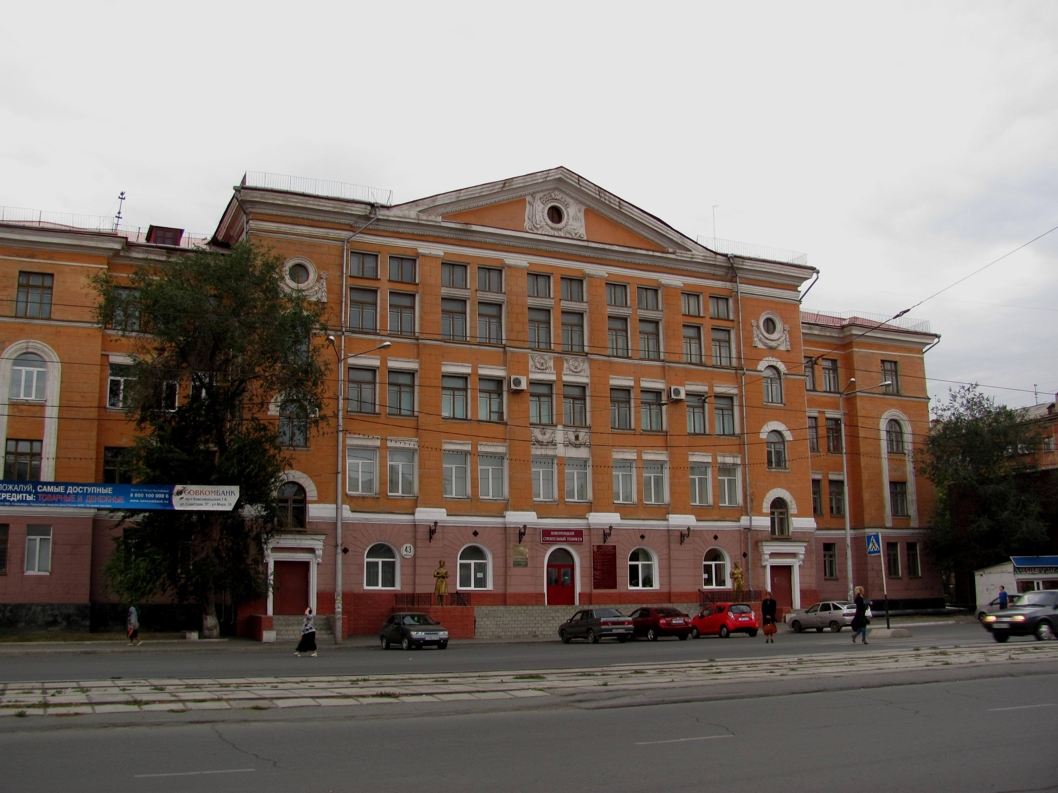 Здание строительного техникума на Советскойй ул. в Новотроицке, Оренбургская область